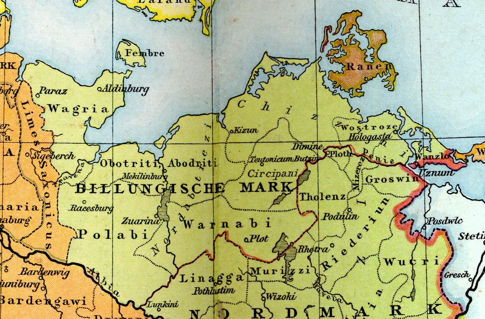 Heiliges Römisches Reich um 1000, Ausschnitt Billungische Mark